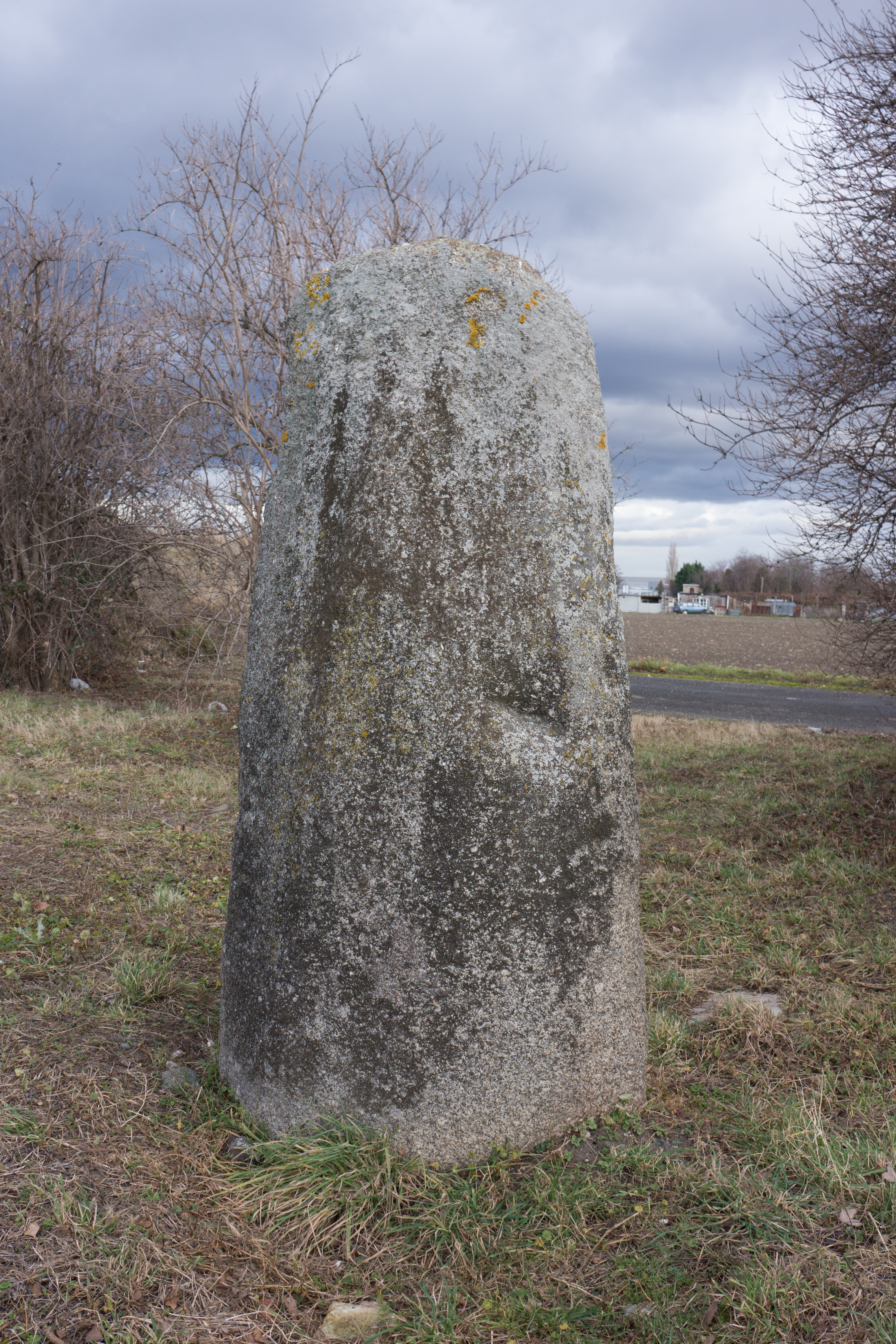 Autre nom: Menhir de Sainte-Anne.